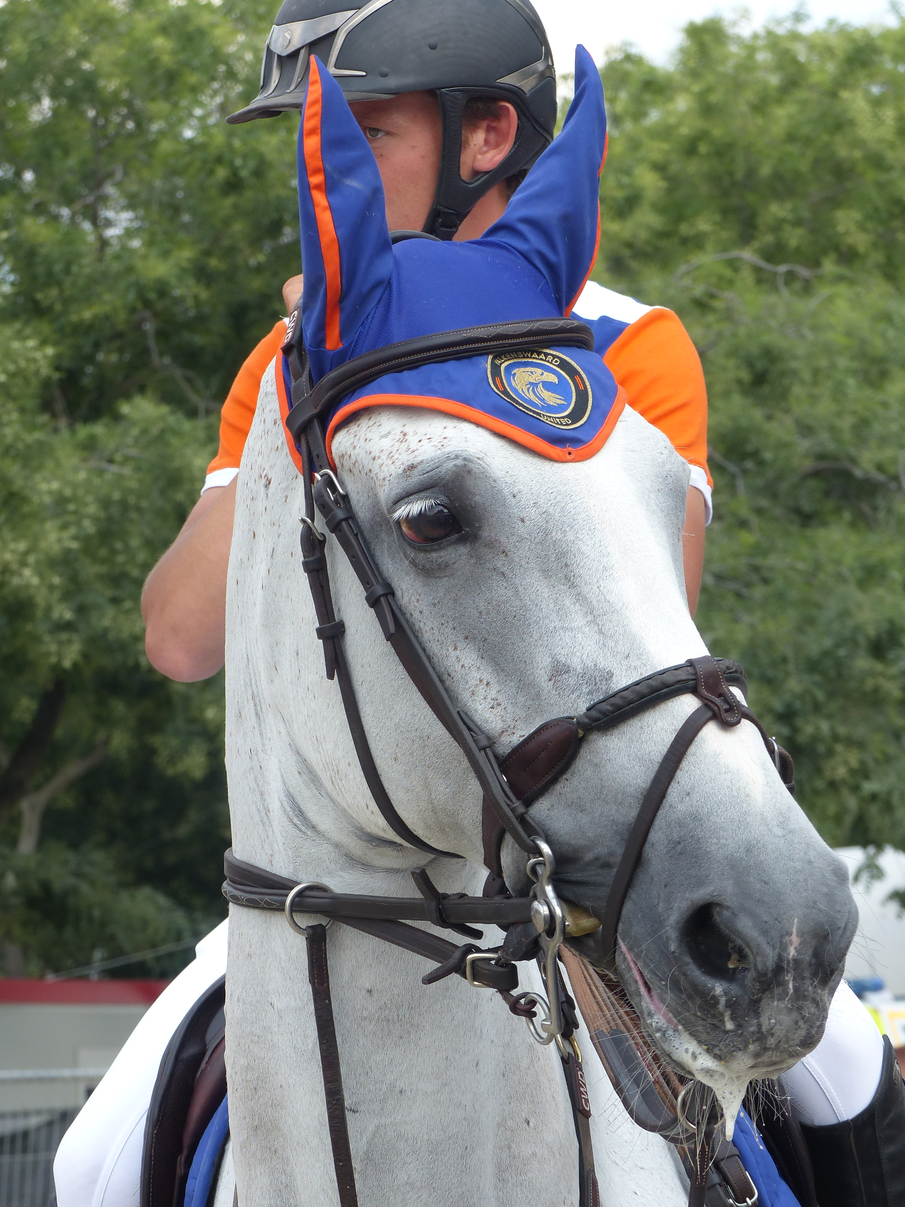 Bertram Allen et son cheval Molly Malone V lors du Paris Eiffel Jumping 2018.